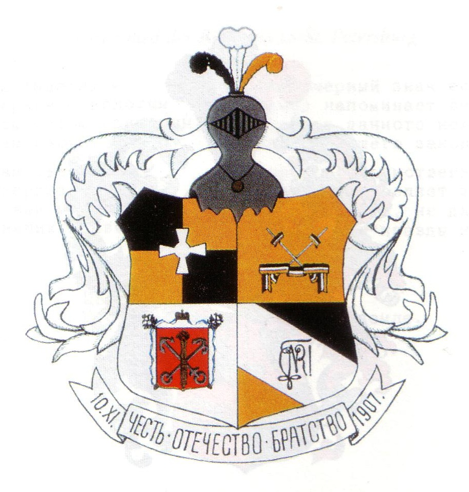 Wappen der russischen Studentenverbindung Neo-Ruthenia in St. Petersburg